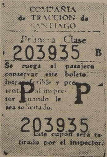 Boleto de los tranvías de la Compañía de Tracción de Santiago, vendido el domingo 20 de octubre de 1940 y ganador de un concurso realizado por la empresa.